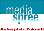 Logo von Mediaspree mit claim